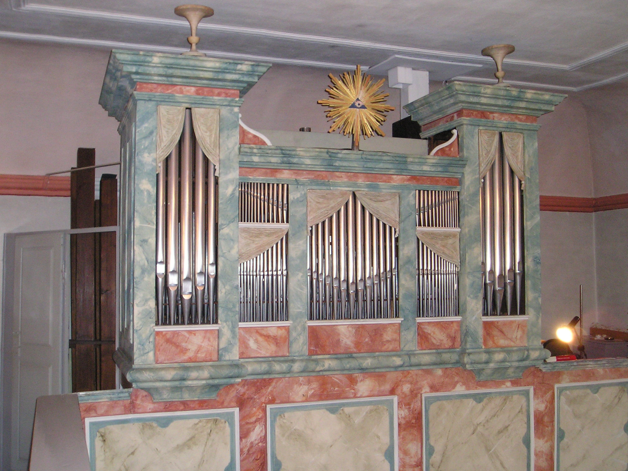 Die Orgel der Ev. Kirche Hennethal, erbaut 1828 von Daniel Raßmann